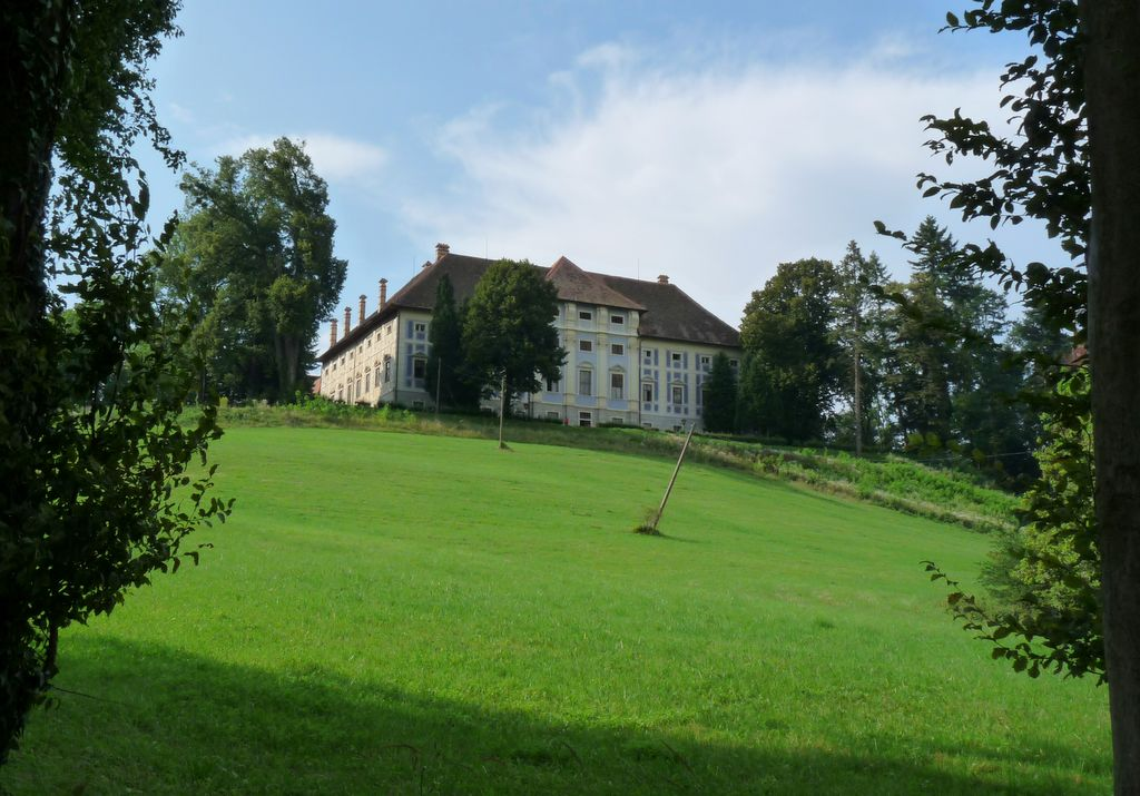 Dvorec Štatenberg